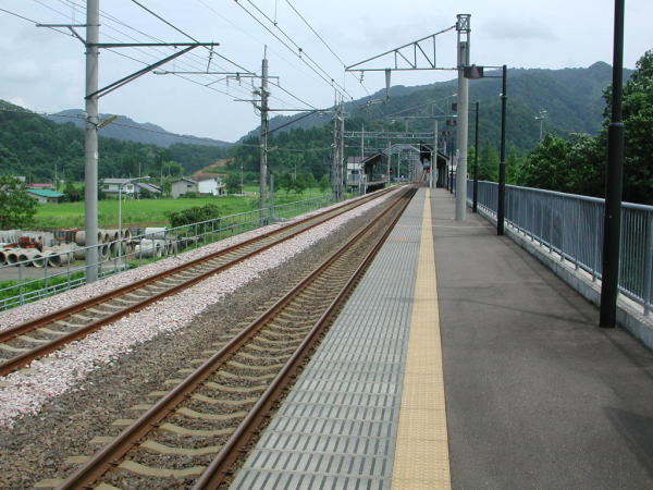 ほくほく線虫川大杉駅